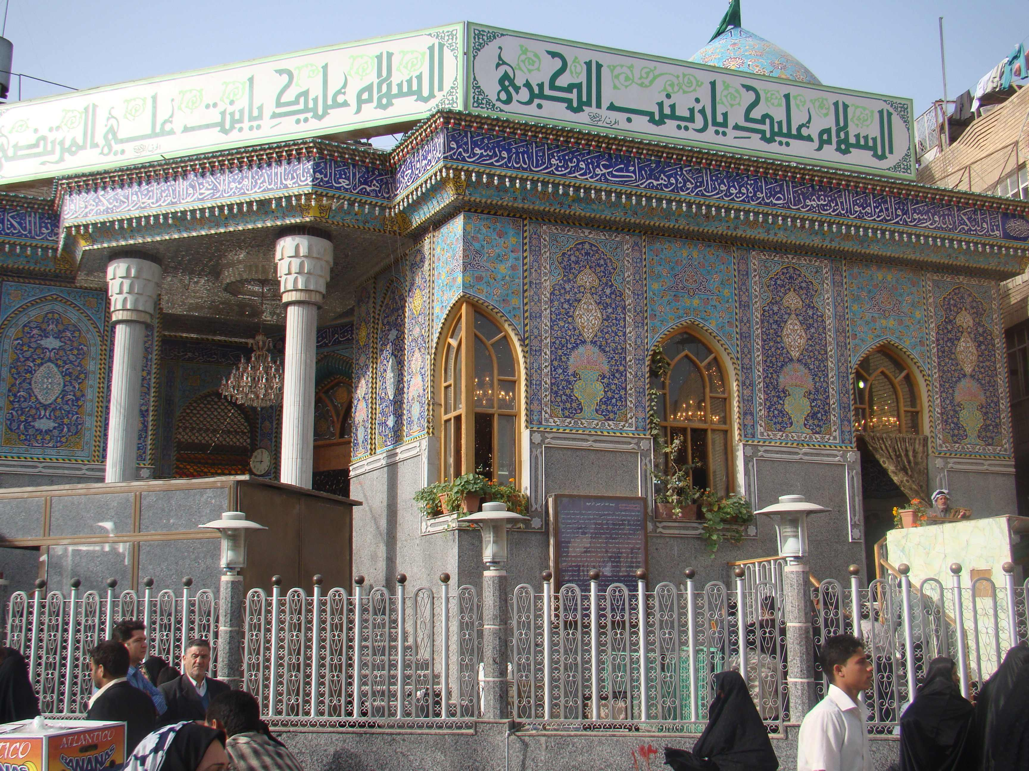 تل زينبيه كربلا